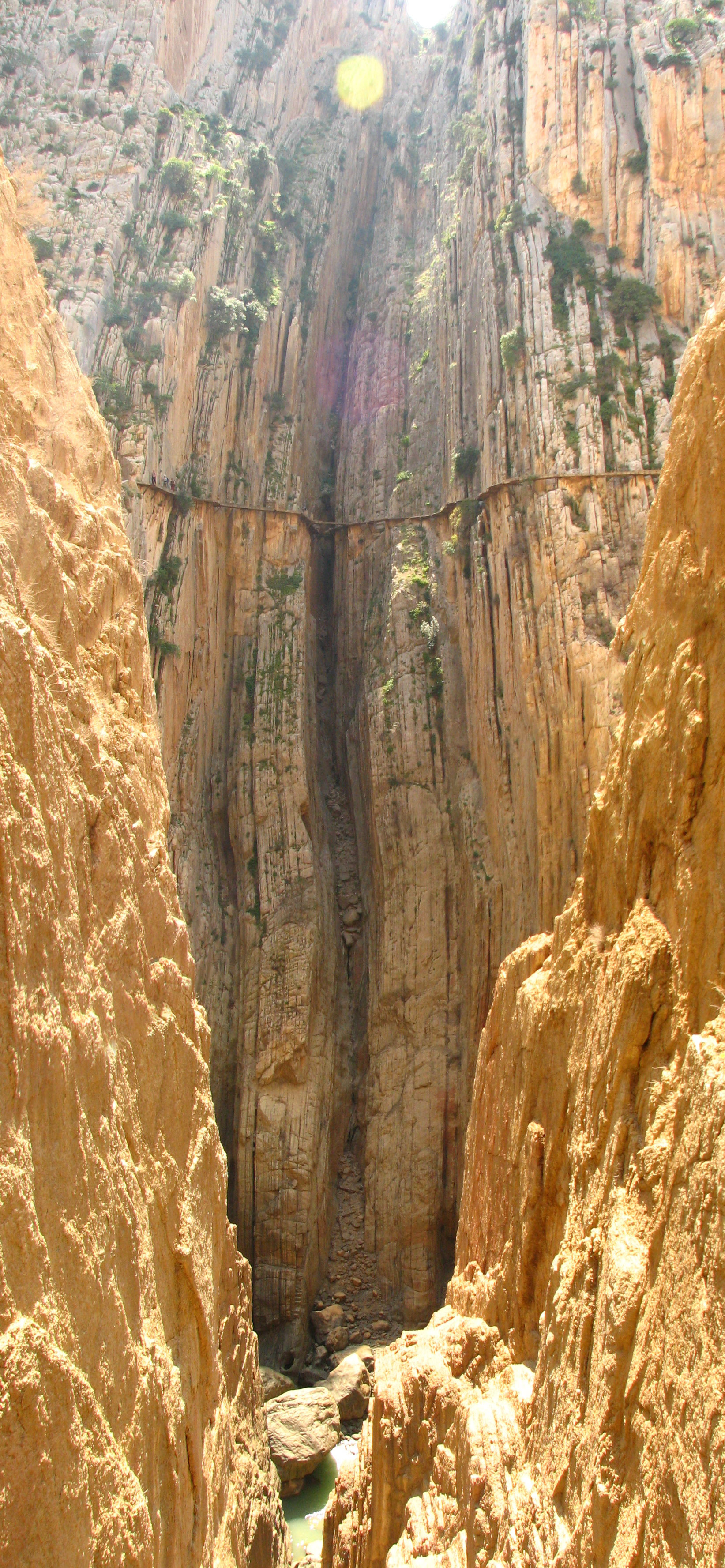 Caminito del Rey in El Chorro (Málaga, Spain)